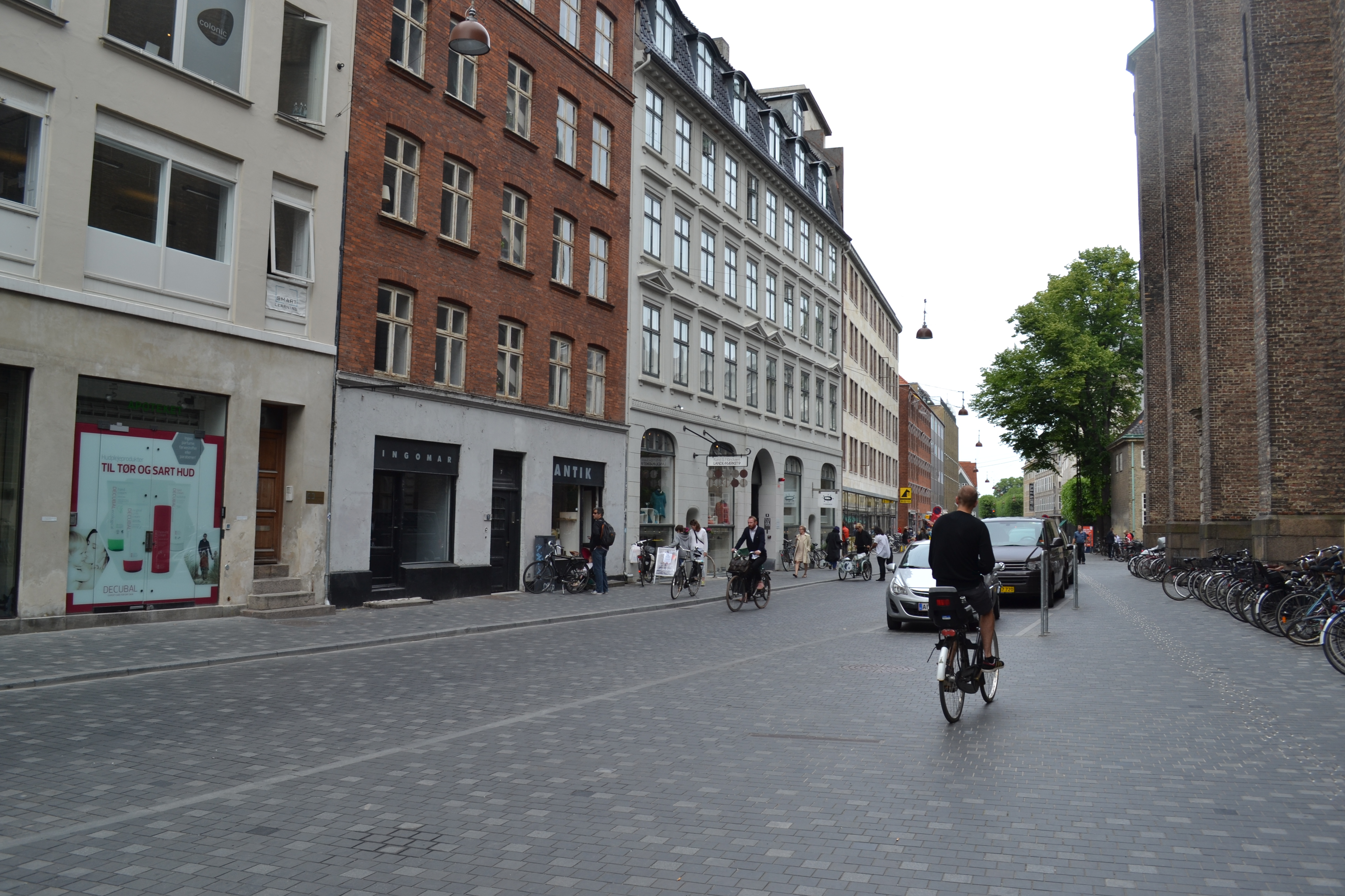 Landemærket in Copenhagen, Denmark